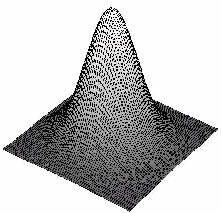 Gaussian Bell